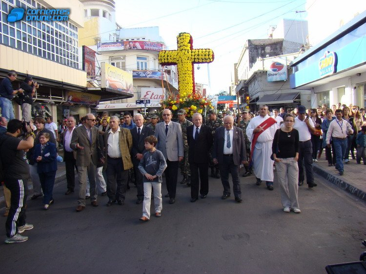 Peregrinación llevada a cabo por los socios de la Sociedad Española de Socorros Mutuos